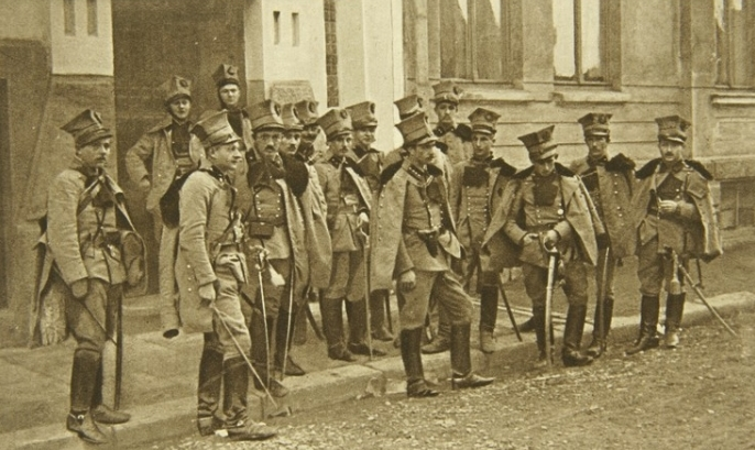 Szwadron rtm. Beliny-Prażmowskiego. Nowy Sącz.